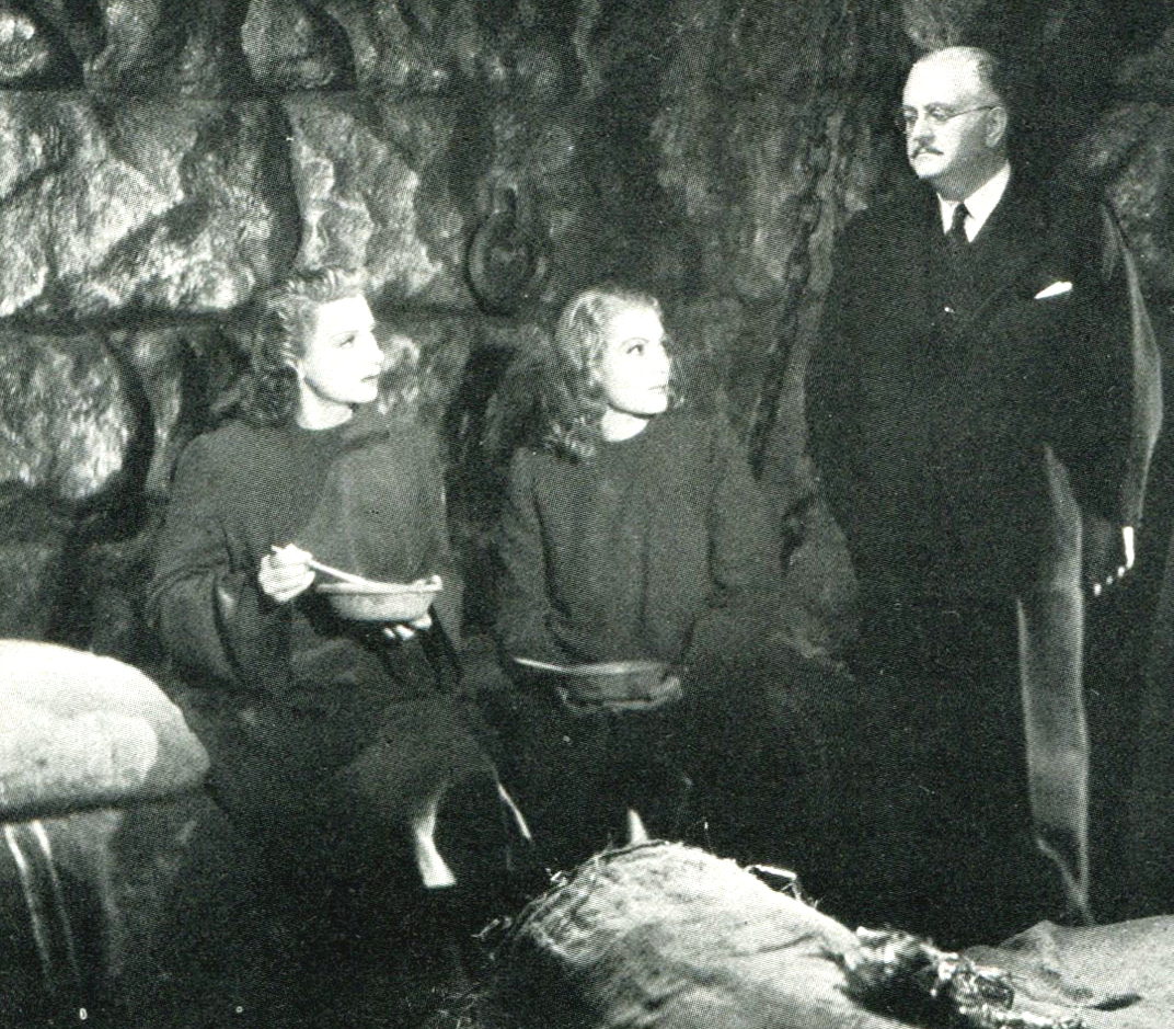 Documento Z 3 (Guarini, 1942). Scena del film con Tina Lattanzi, Isa Miranda e Gugllelmo Bernabò